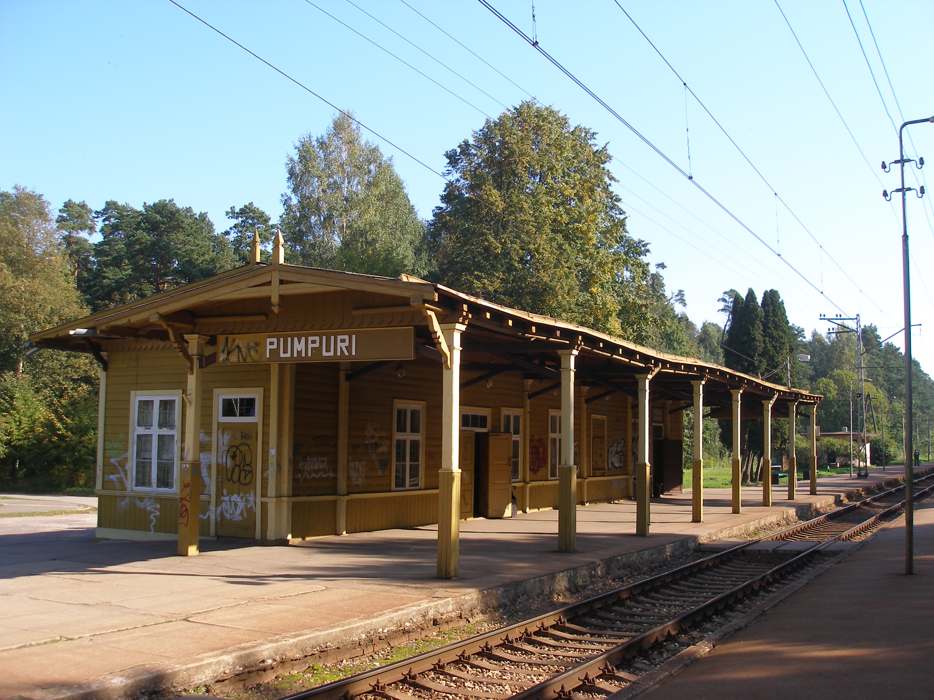 Pumpuru stacijas ēka.